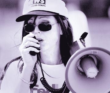 Andrea Hackett at LVDA Rally